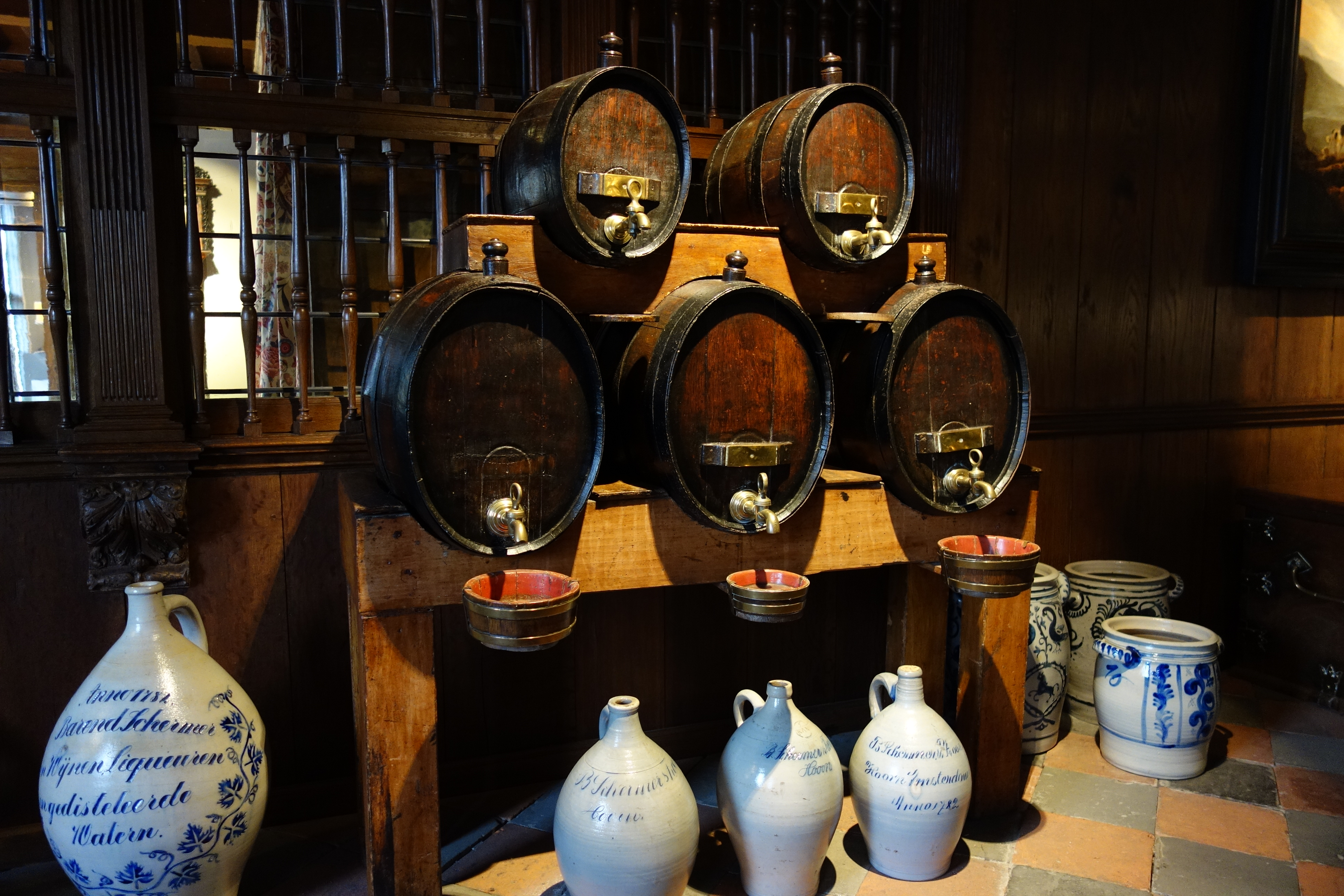 Drankorgel: stellage met vaten met sterke drank. Drankorgel staat in het Westfries Museum.